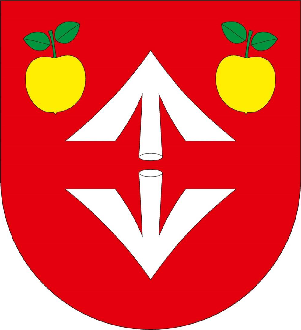 Herb gminy Samborzec.